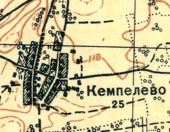 Топографическая карта Ленинградской области, квадрат О-35-24-Б-а (Переярово), деревня Кемпелево